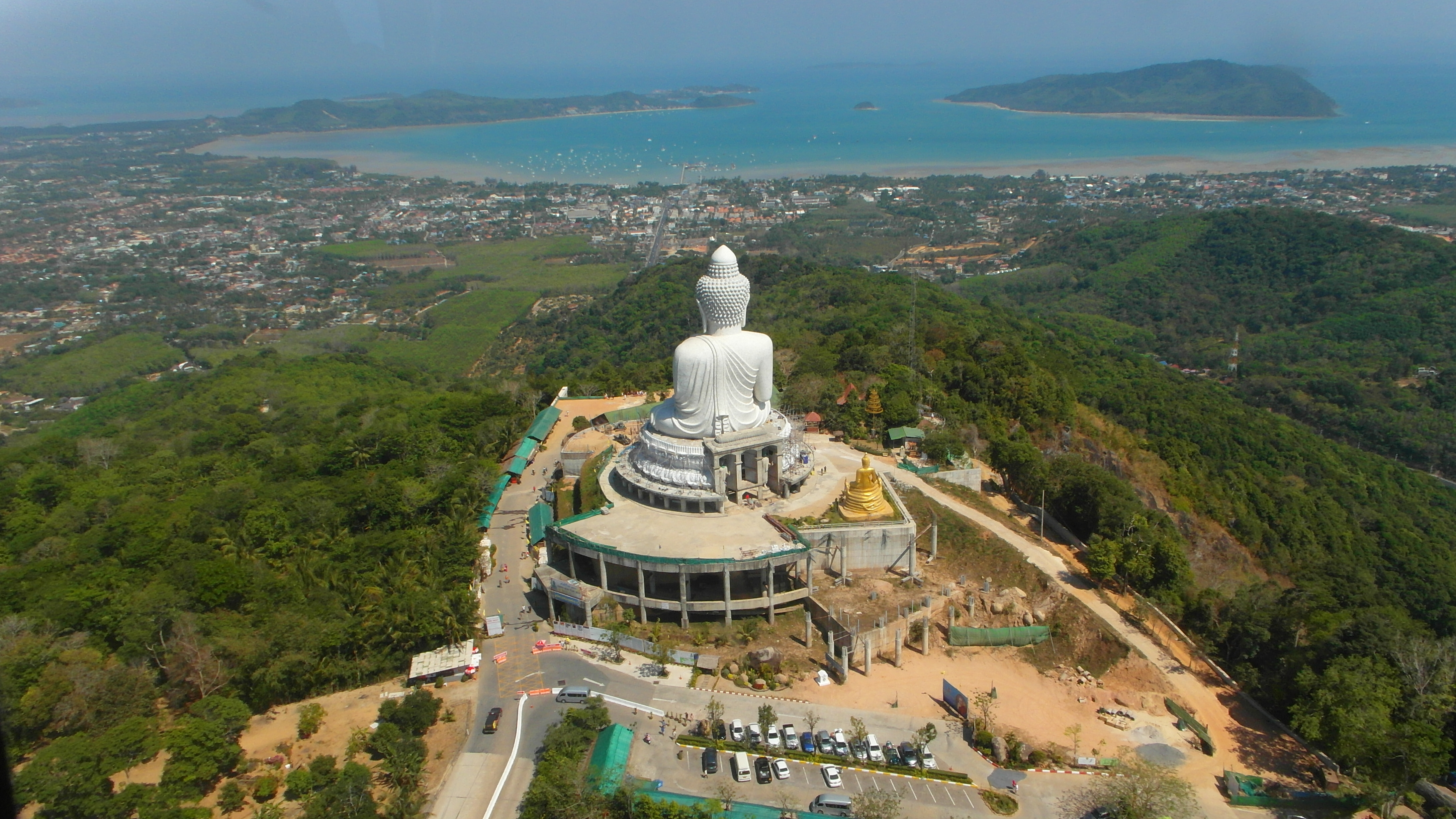 "Big Budda" Phuket 2014 february